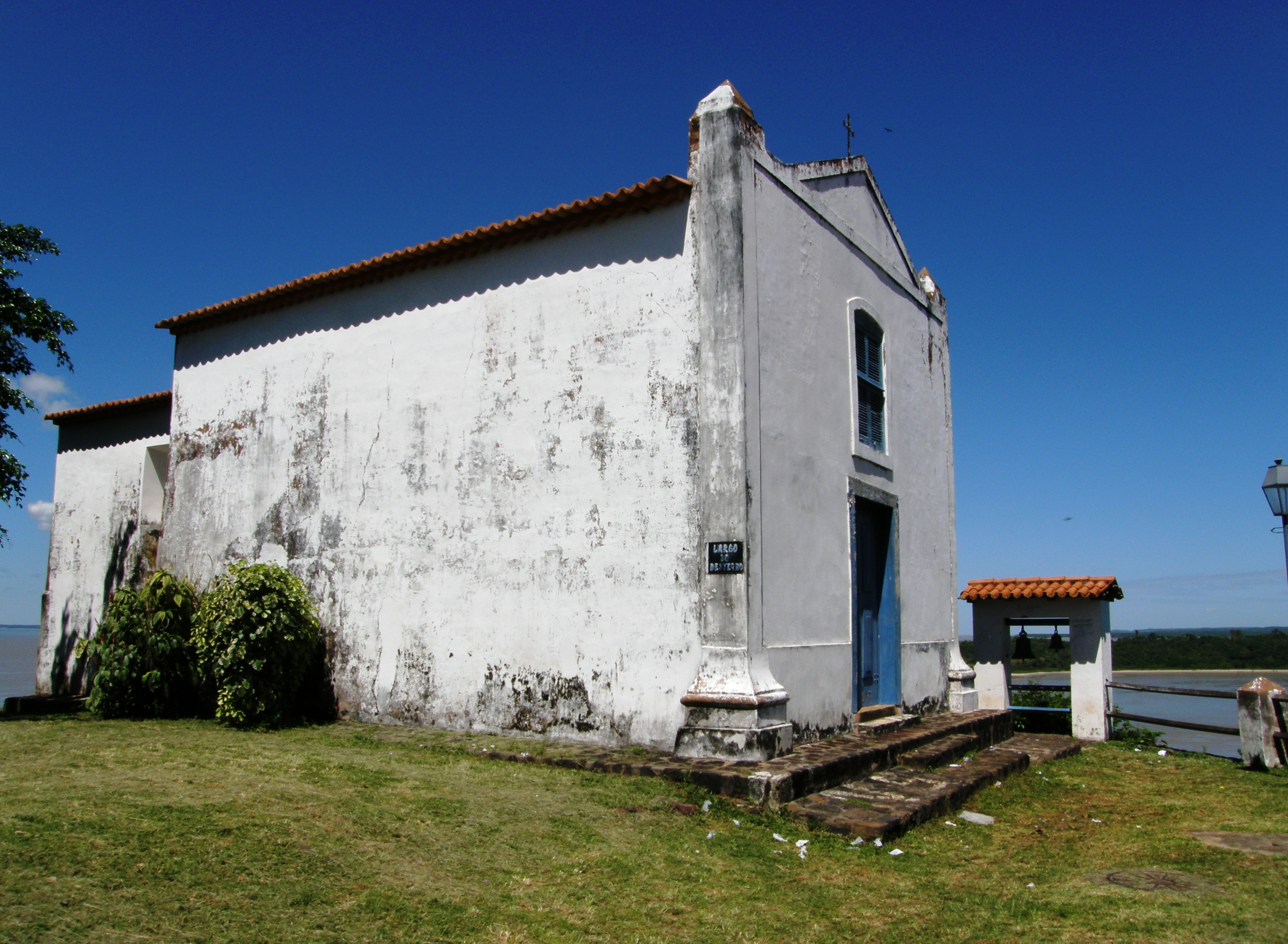 Alcântara, MA: conjunto arquitetônico e urbanístico